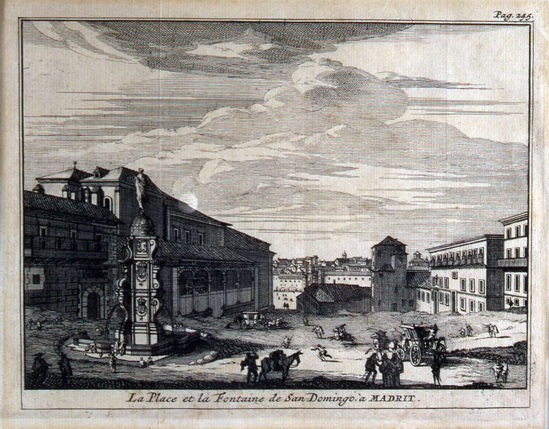 Vista de la Plaza de Santo Domingo de Madrid desde el sur, con la fuente ornamental que entre 1637-1865 estuvo en ese entorno del viejo Madrid. Copia de 1707, a partir del grabado original de Louis Meunier (hacia 1660).